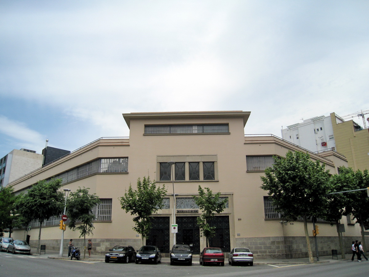 Fàbrica de perfums Myrurgia a Barcelona (Catalunya). Obra d'Antoni Puig i Gairalt de 1929.